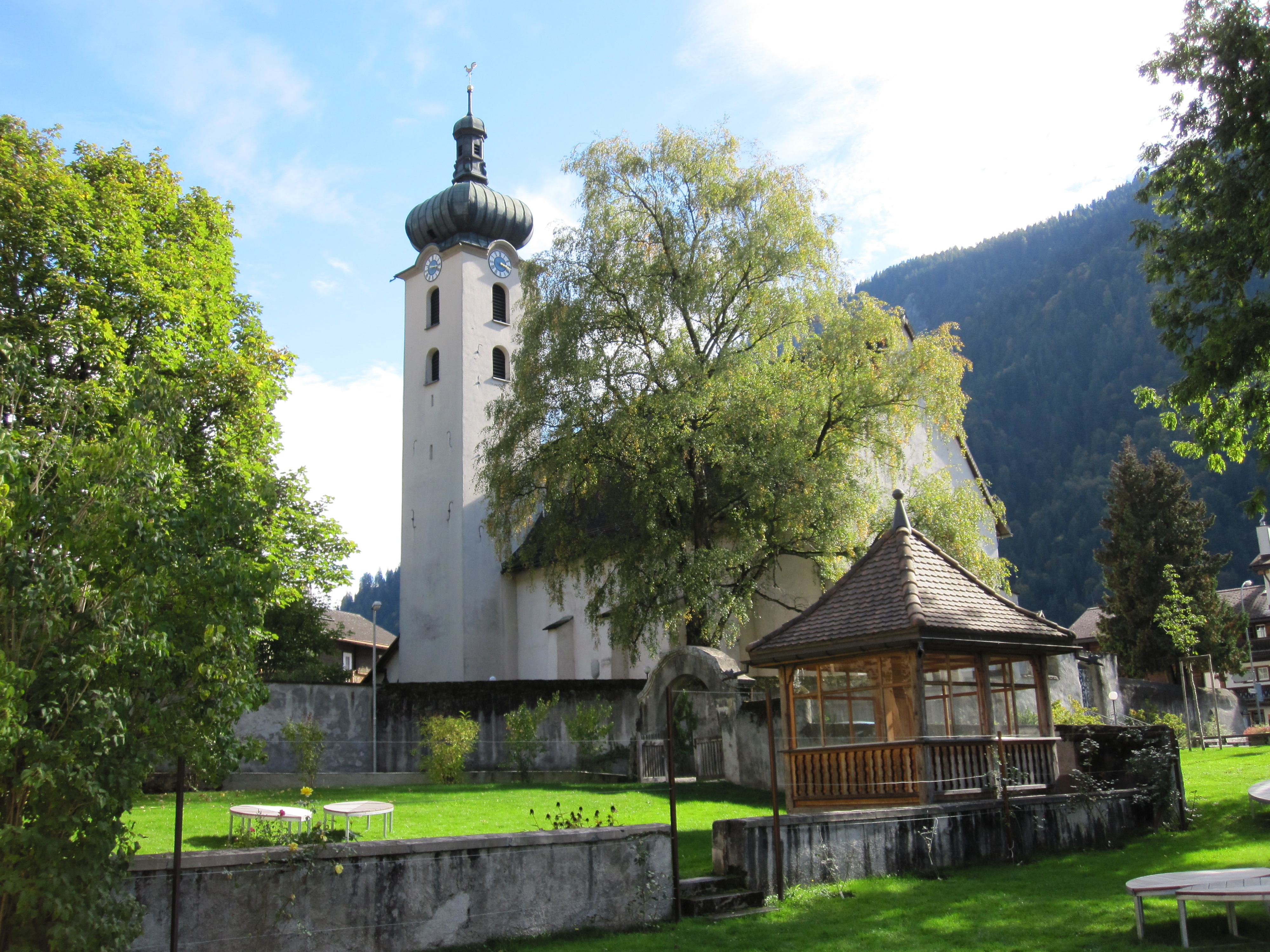 reformierte Kirche Schiers (Kanton Graubünden)